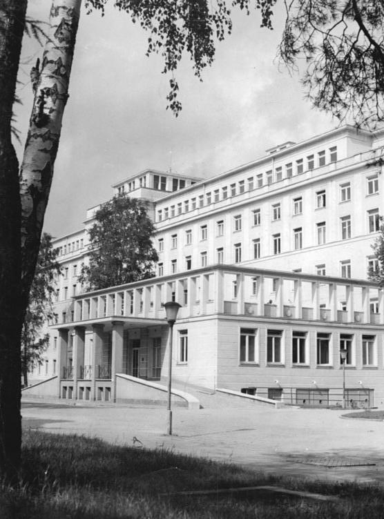 Dresden, Medizinische Akademie, chirurgische Klinik Zentralbild Quasch. 1.8.1956 Chirurgische Klinik der medizinischen Akademie in Dresden. Am 15. Februar 1956 wurde nach einer Bauzeit von zwei Jahren die chirurgische Klinik der medizinischen Akademie in Dresden-Johannstadt eröffnet. Sie ist nach den modernsten Gesichtspunkten erbaut und eingerichtet, trotzdem man sich beim Bau an die vorhandenen Grundrisse eines ausgebombten Gebäudes richten mußte. Sie verdankt ihre allen Erfordernissen entsprechende Gestaltung der lange vorhergehenden Planung (5 - 6 Jahre) und einer systematischen Zusammenarbeit zwischen Architekten und Ärztekollektiv. Die Klinik wurde mit einem Kostenaufwand von ca. sieben Millionen DM errichtet, einschliesslich aller Importe für die Einrichtung. Sie hat eine Kapazität von 325 (drei zwei fünf) Betten und nimmt nur chirurgische Fälle auf. Die Patienten kommen vor allen Dingen aus den Bezirken Dresden und Karl-Marx-Stadt. Spezialfälle kommen aus der gesamten DDR nach Dresden. Spezialgebiete der Klinik sind die Thorax-, Neuro-, Unfall- und Kinderchirurgie. Auf diesen Gebieten wird nicht nur die Heilbehandlung durchgeführt, sondern auch wissenschaftliche Forschung betrieben. UBz: Aussenansicht der Klinik. Im Vordergrund die Aufnahmehalle mit Untersuchung- und Wartezimmern. Im 5. Stockwerk der Operationstrakt, wobei die Klinik vom Mittelgang (hinter dem Baum) nach rechts und links in einen septischen bezw. aseptischen Flügel aufgeteilt ist.